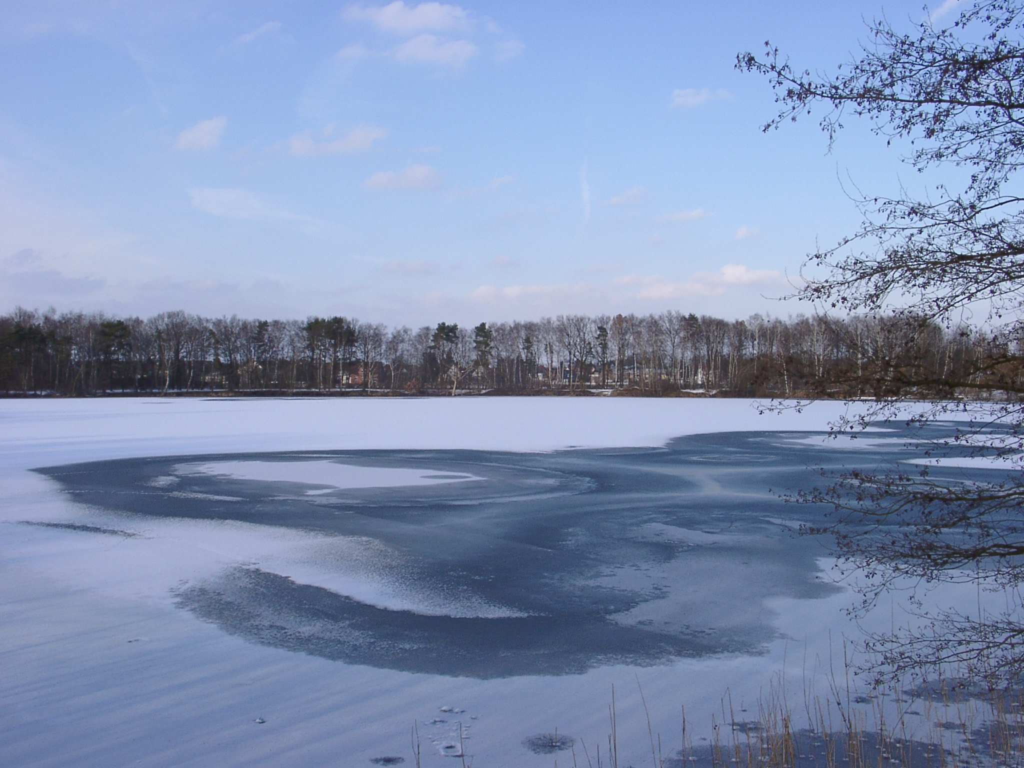 Garbsen, Schwarzer See im Winter. 2005-03-04